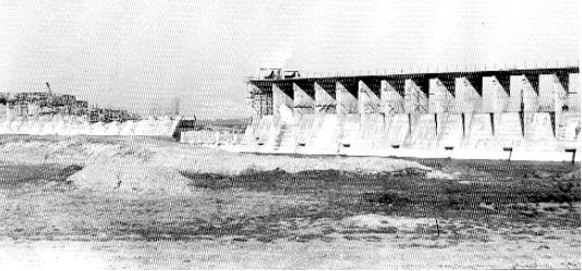 Presa Ingeniero Roggero, Río Reconquista.